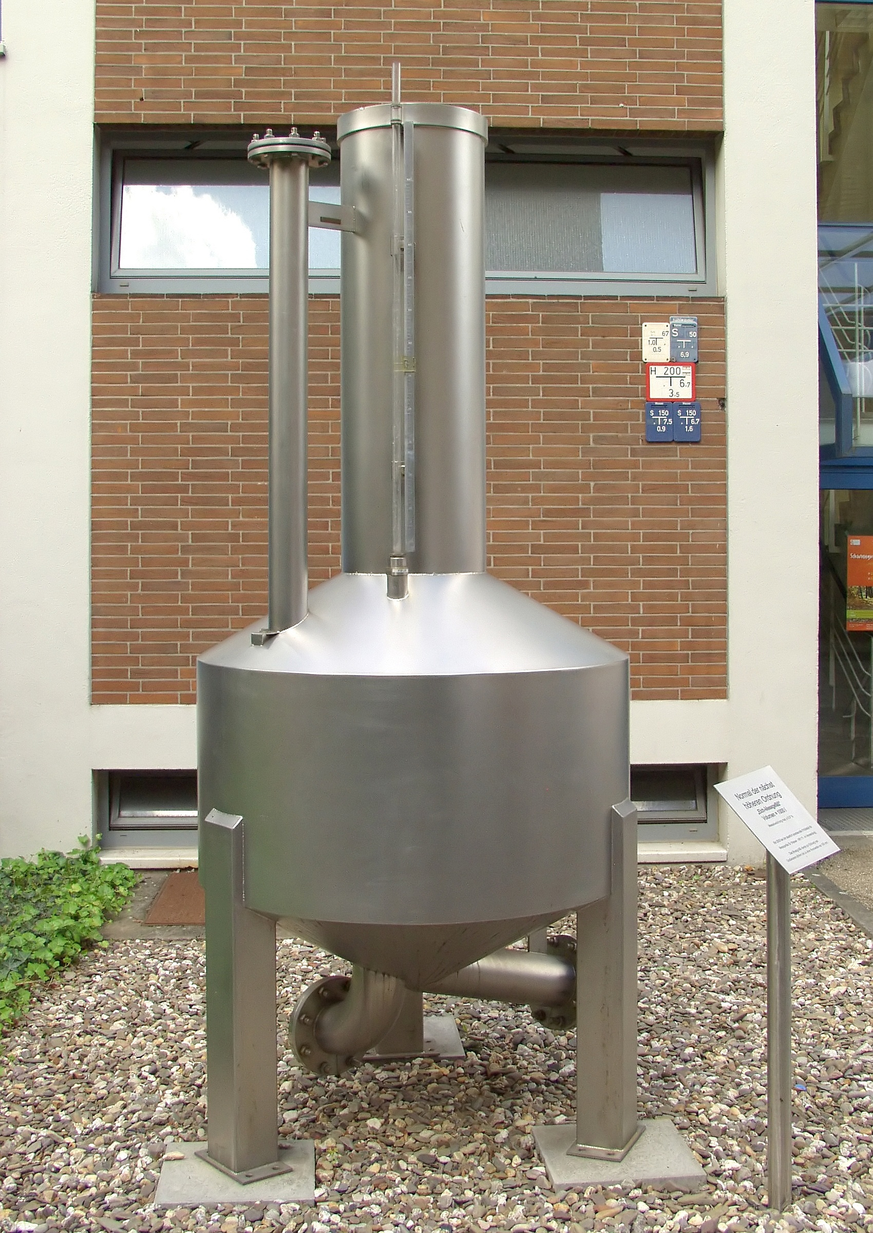 Eich-Messgefäß. Normal der nächsthöheren Ordnung. Volumen: 1000 Liter. Messabweichung max. ± 0,07 %. Das Messgefäß diente zur Eichung von Großwasserzählern bis zu einer Nennweite von 100 mm. Ausgestellt vor dem Zähler-Prüfamt auf dem RheinEnergie Betriebsgelände Zugweg, Köln.